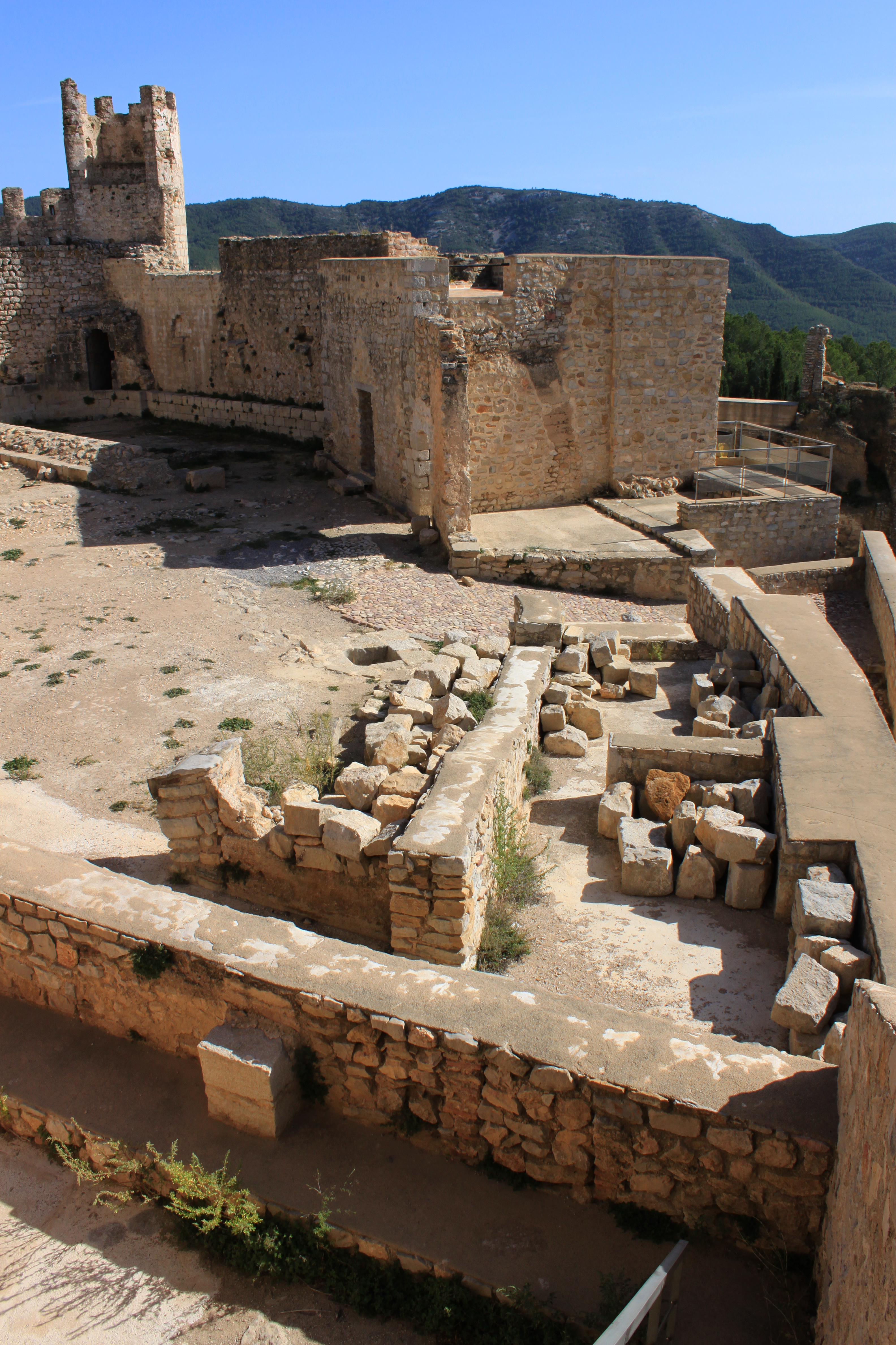 Castillo de Xivert. Interior del recinto de la alcazaba. Se observa a la derecha el acceso principal, junto a él los restos de las dependencias del alcázar. Tras ello la torre sur y las dependencias adosadas a la muralla y los restos de la capilla. Al fondo a la izquierda se observa una de las torres circulares construidas por la Orden del Temple en el siglo XIII. Alcalá de Xivert, provincia de Castellón, Comunidad Valenciana, España.